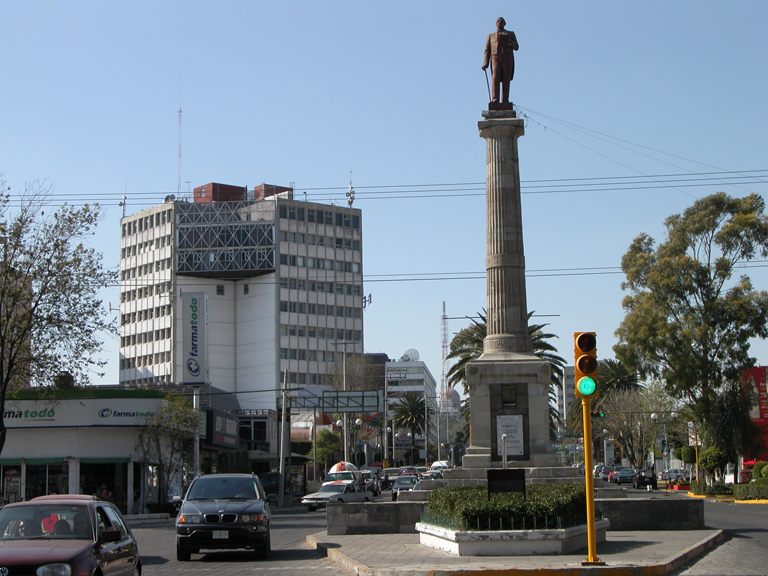 Ave. Juárez in Puebla, Mexico